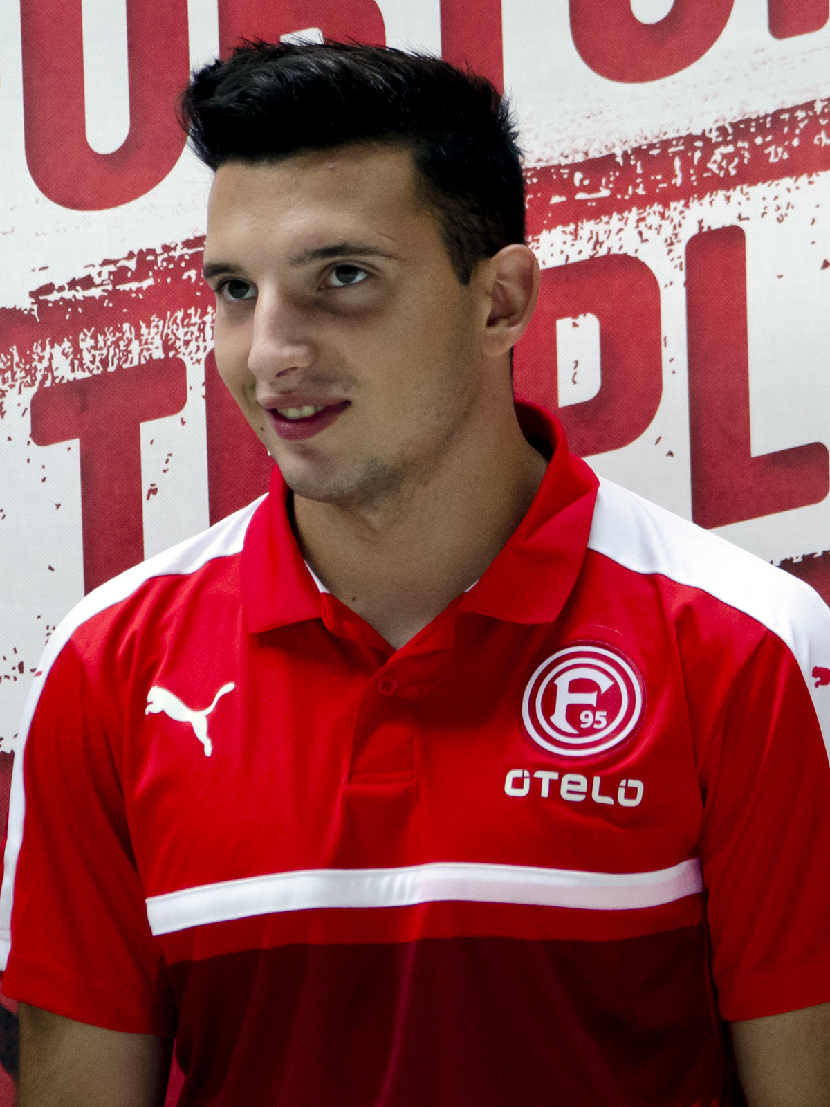 Arianit Ferati, deutsch-kosovarischer Fußballspieler (2016)